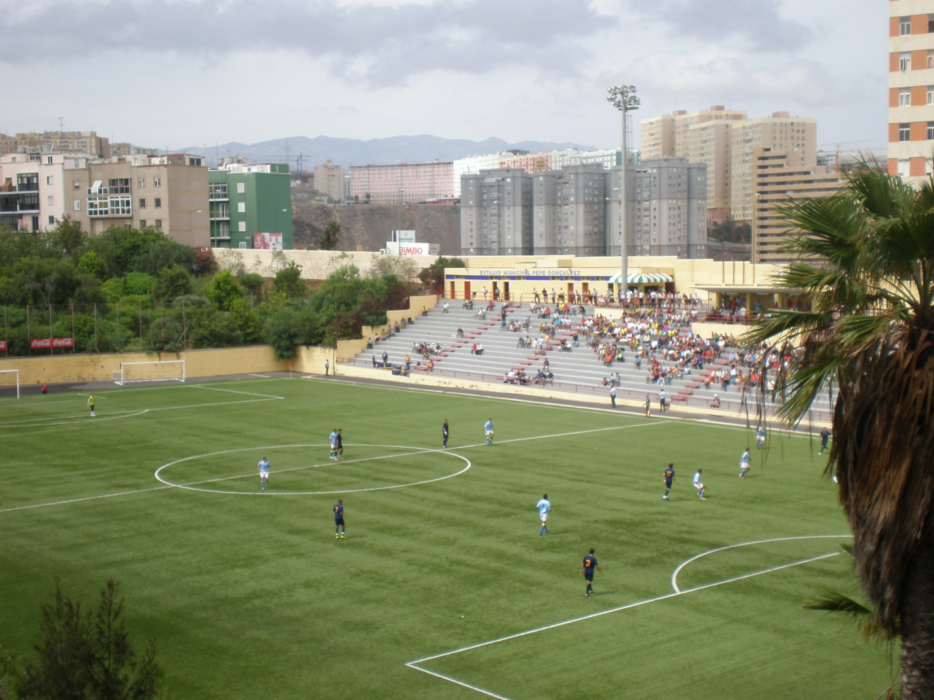 Vista del Estadio Pepe Gonçalvez de Las Palmas de Gran Canaria el 31 de agosto de 2008.